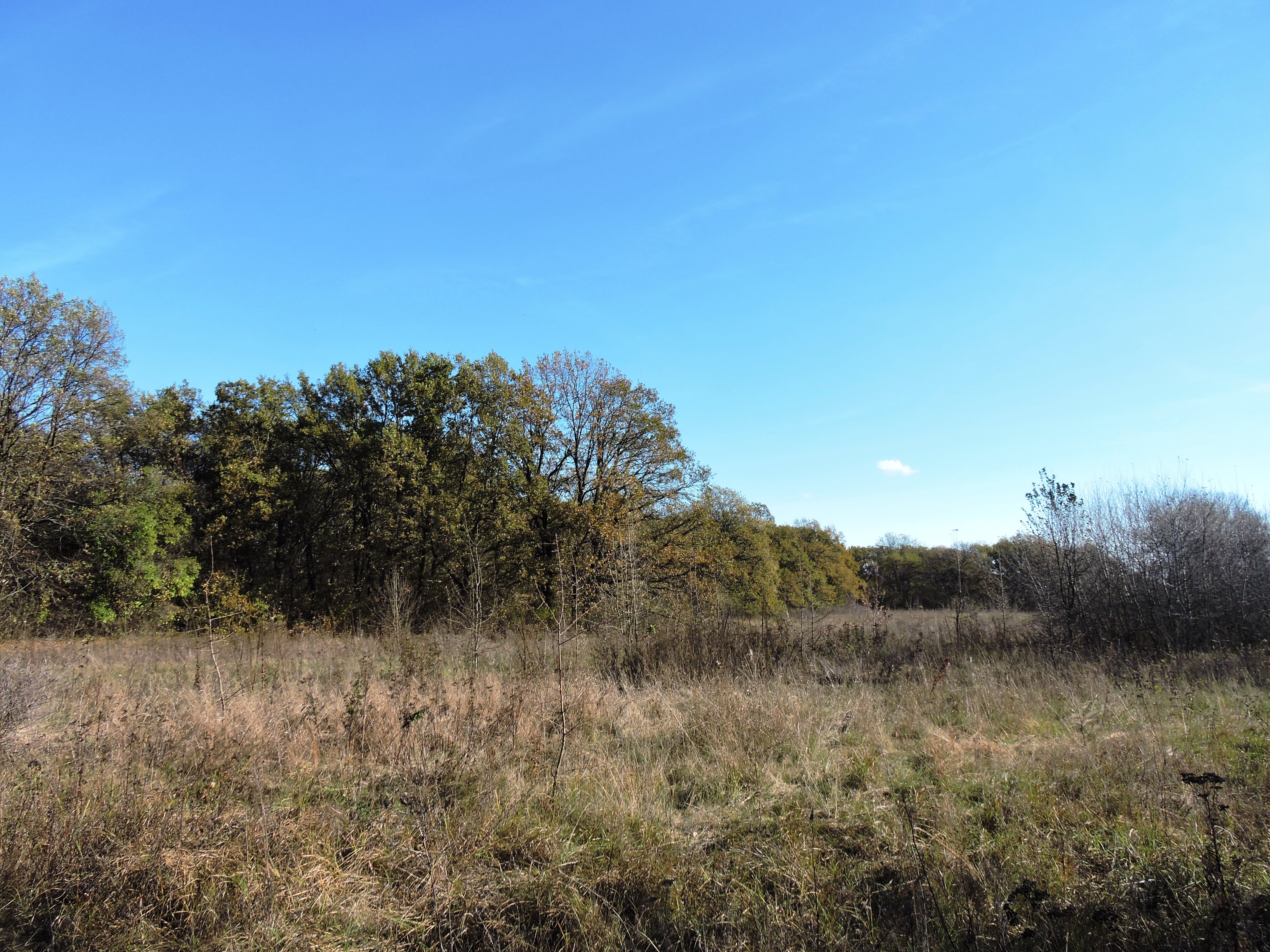 Стоянка доби неоліту., Яремівка, на лівому березі р. С. Донець в урочищі “Смертобоїще” на півн-зах від села